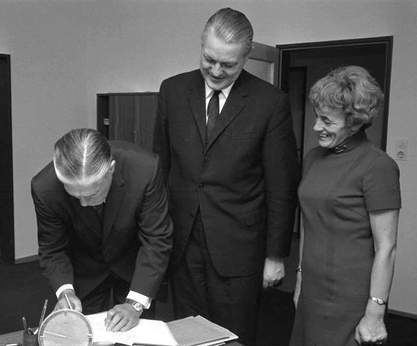 BM Stoltenberg empfängt den US Gouverneur, Romney [republikanischer Präsidentschaftskandidat]